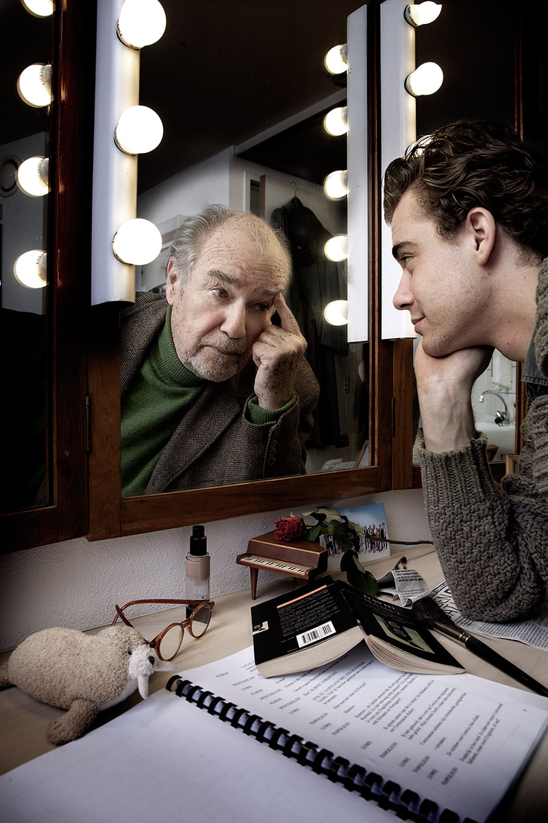 Bij de voorstelling Levenslang Theater met Eric Schneider (links) en Beau Schneider, 2013.